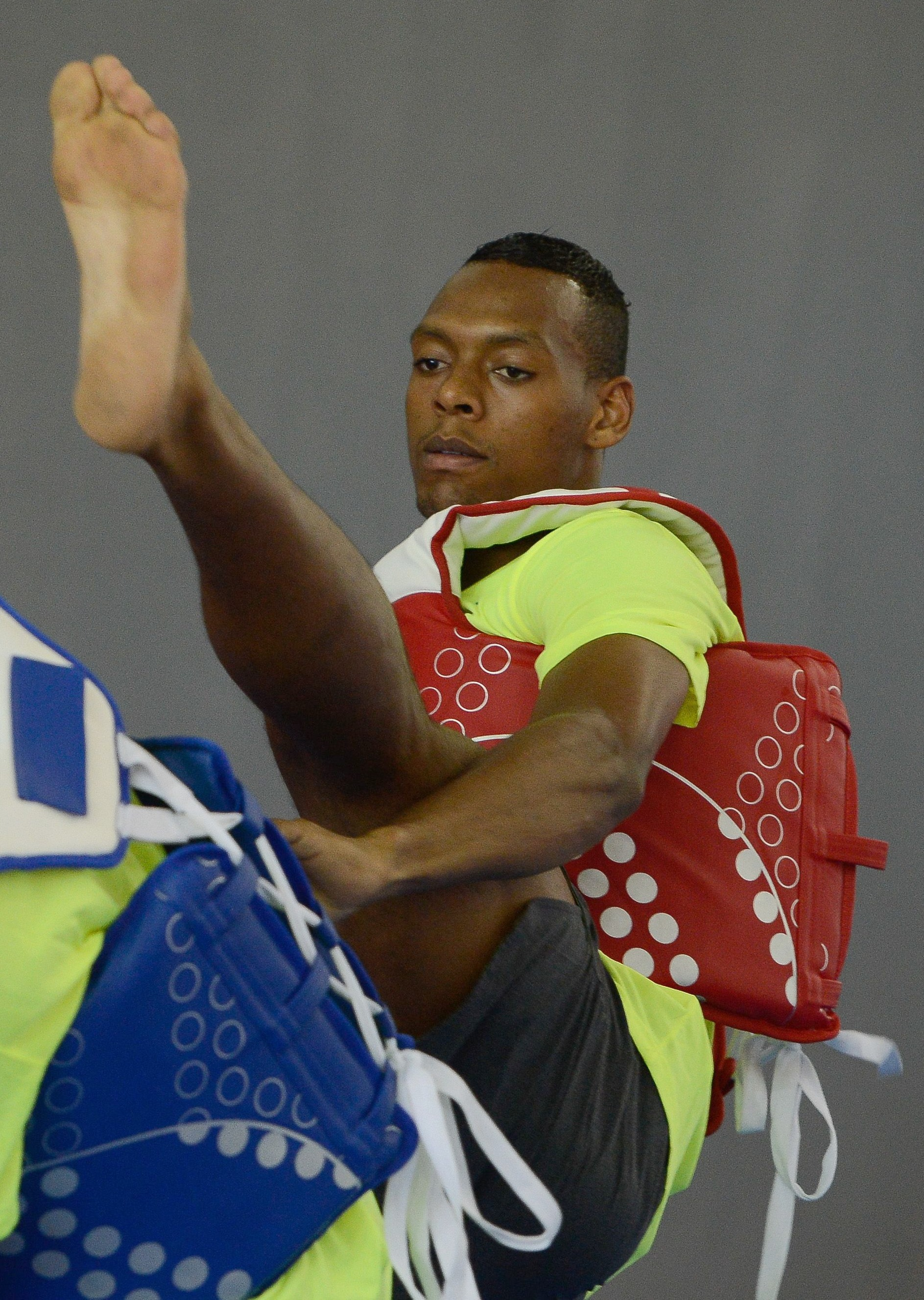 Rio de Janeiro - Atletas de taekwondo treinam para as Olimpíadas Rio 2016 na casa do Time Brasil na Urca (Tomaz Silva/Agência Brasil)